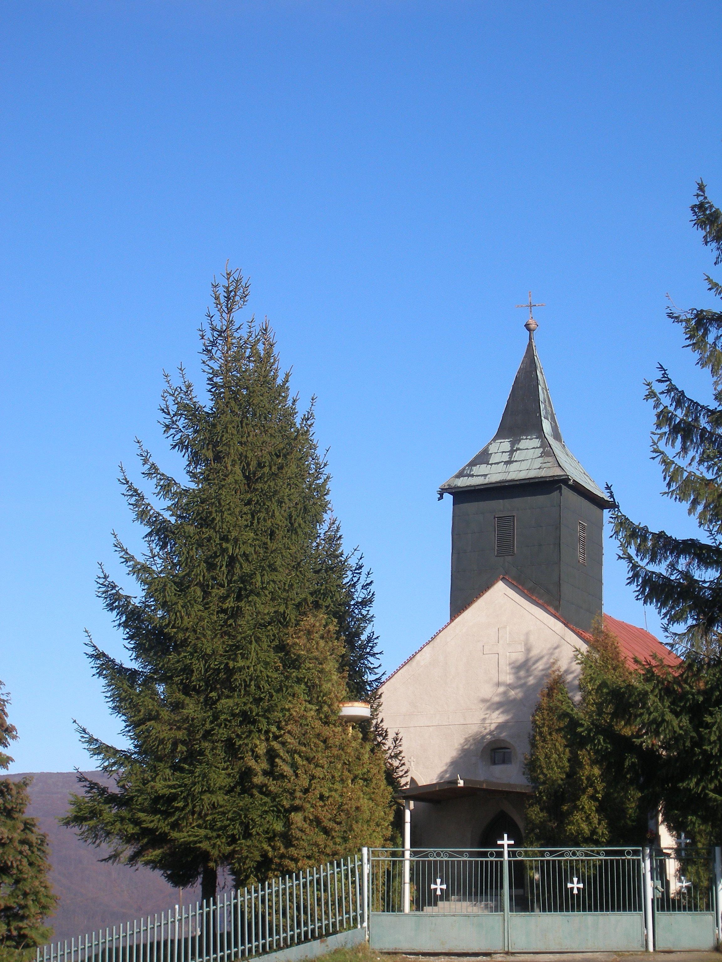 Gréckokatolícky Kostol Narodenia Presvätej Bohorodičky v obci Abranovce (okr. Prešov)